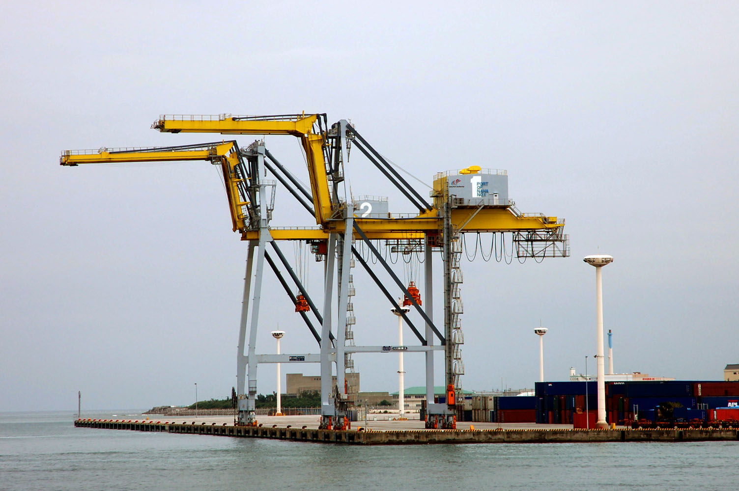 那覇国際コンテナターミナル